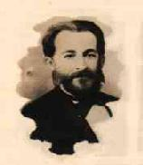 Jean Antonie Félix Dissandes de Monlevade, especialista em mineração francês, fundador da primeira usina siderúrgica do país e do município de João Monlevade